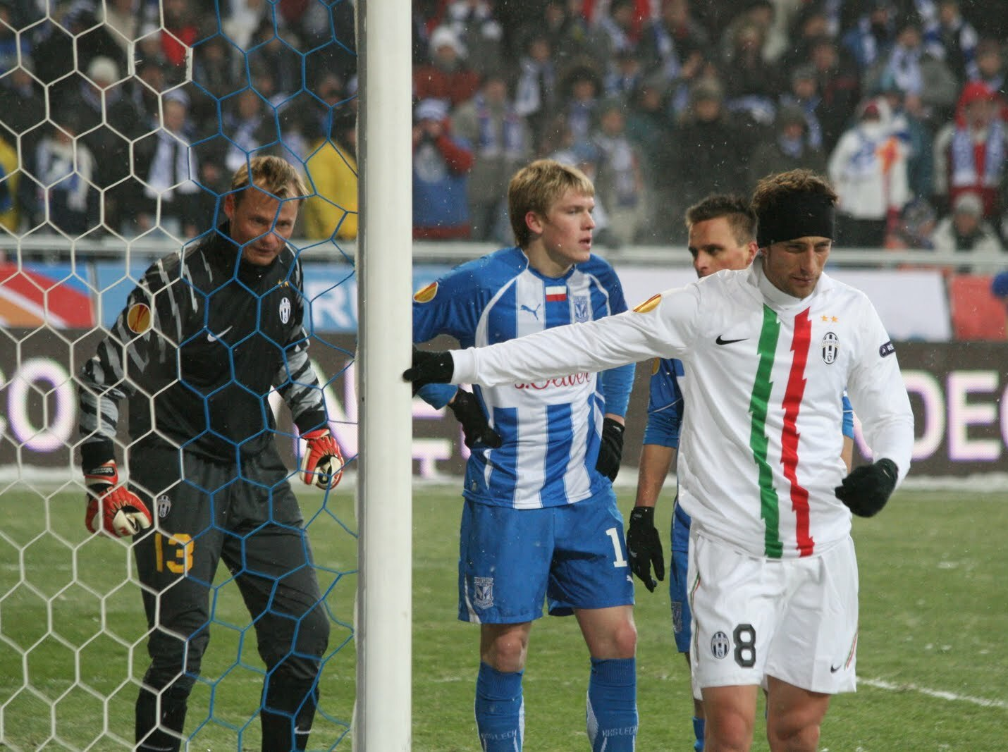 Claudio Marchisio difende il primo palo su un calcio d'angolo, Lech Poznań vs Juventus, UEFA Europa League, 1º dicembre 2010.